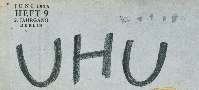 Logo von UHU